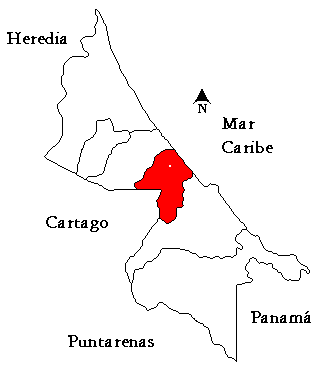 Mapa del cantón de Matina, provincia de Limón, Costa Rica